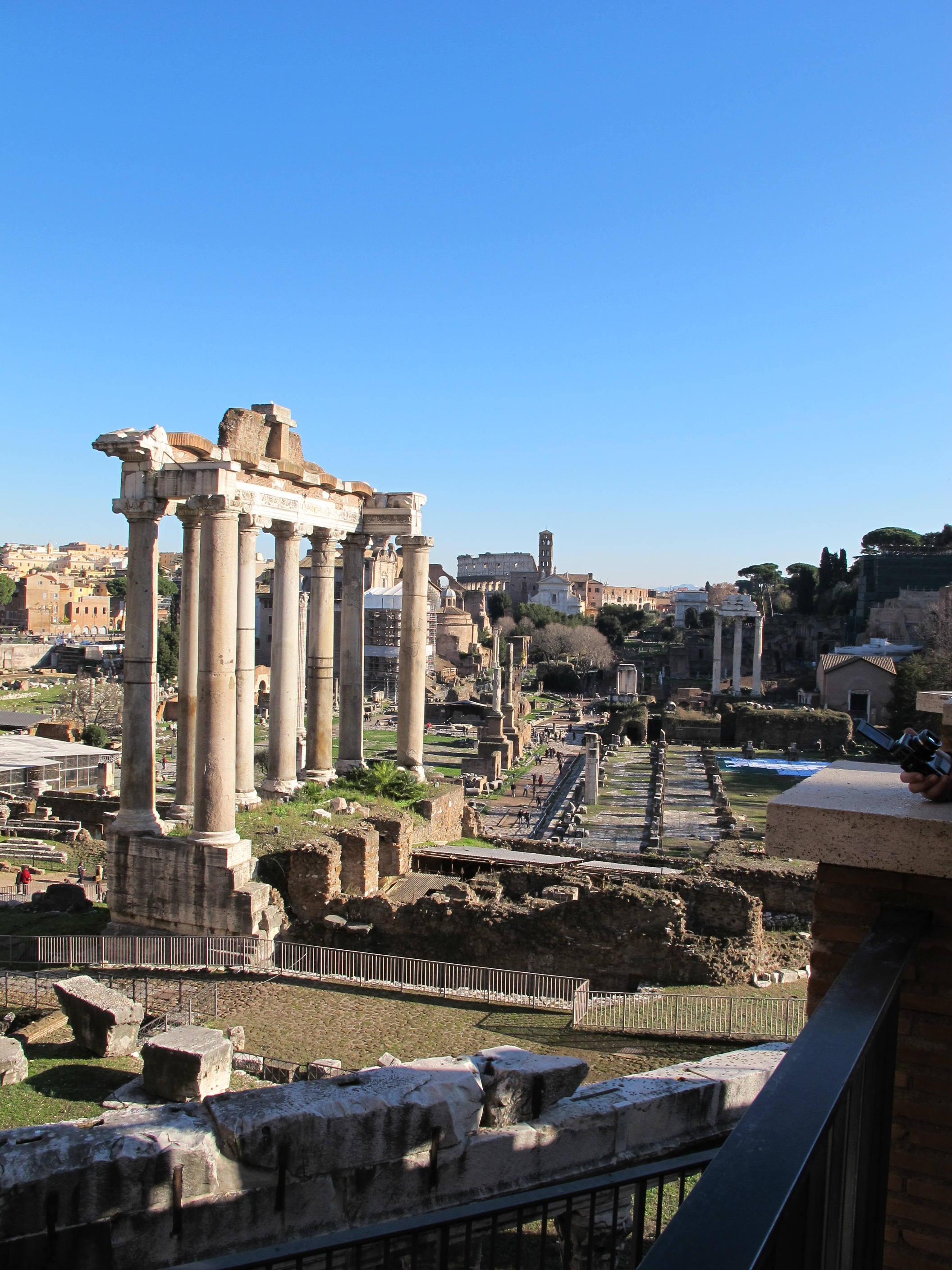 Foro romano dal campidoglio